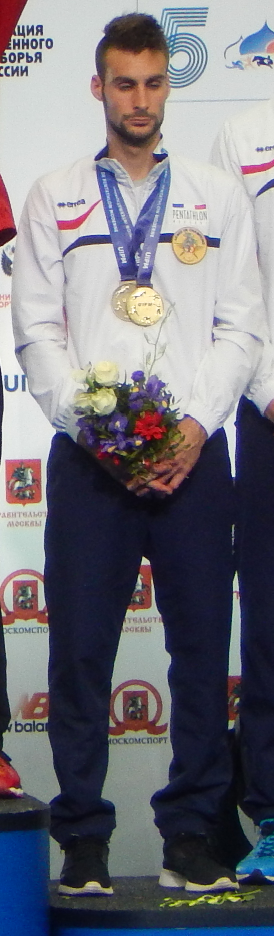 Чемпионат мира по современному пятиборью 2016. Церемония награждения в командных соревнованиях у мужчин